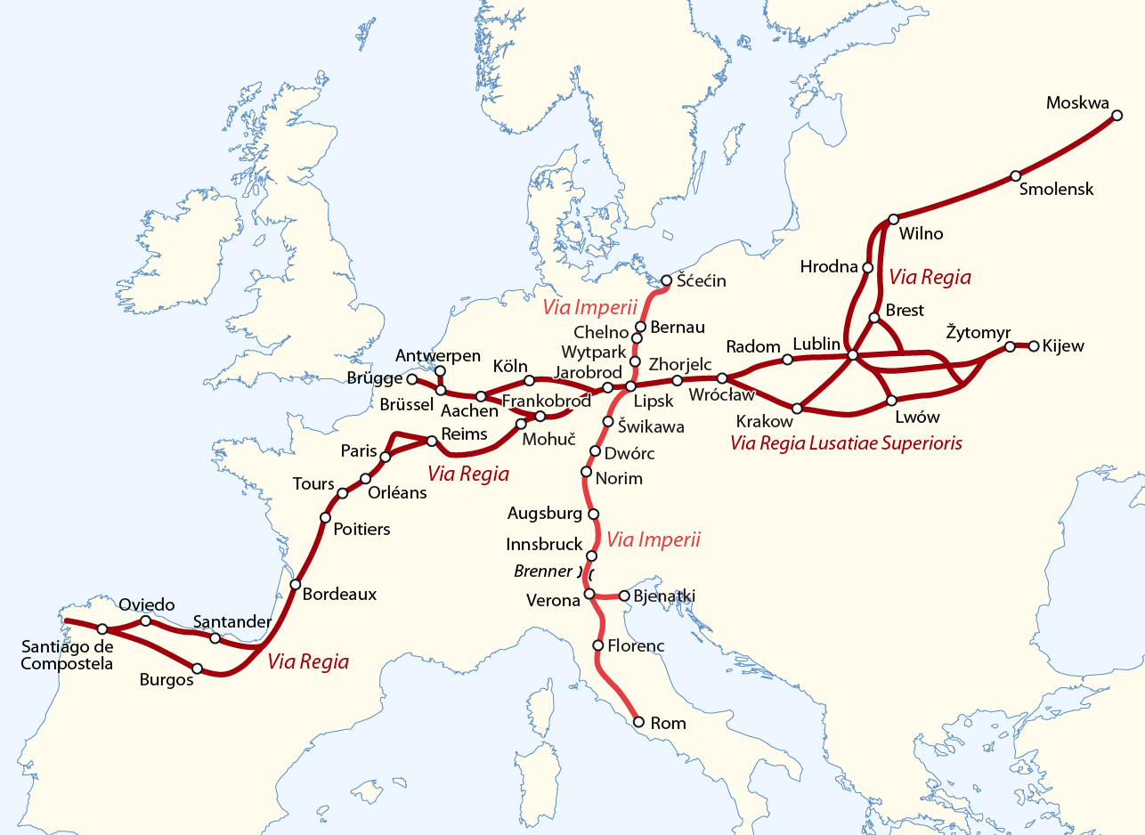 Verlauf der Via Regia und der Via Imperii